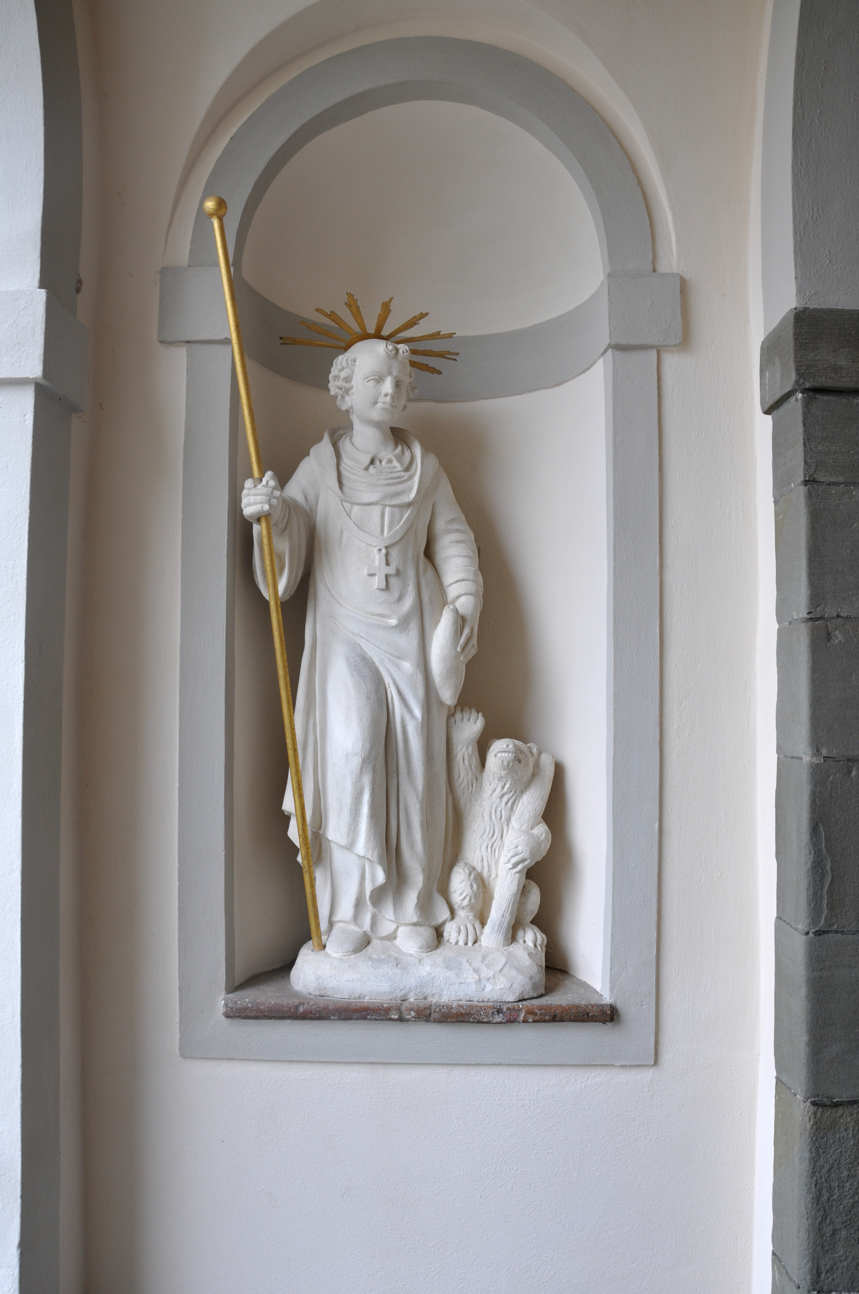 Kißlegg, Pfarrkirche, Skulptur am Eingang: Hl. Gallus mit dem Bär